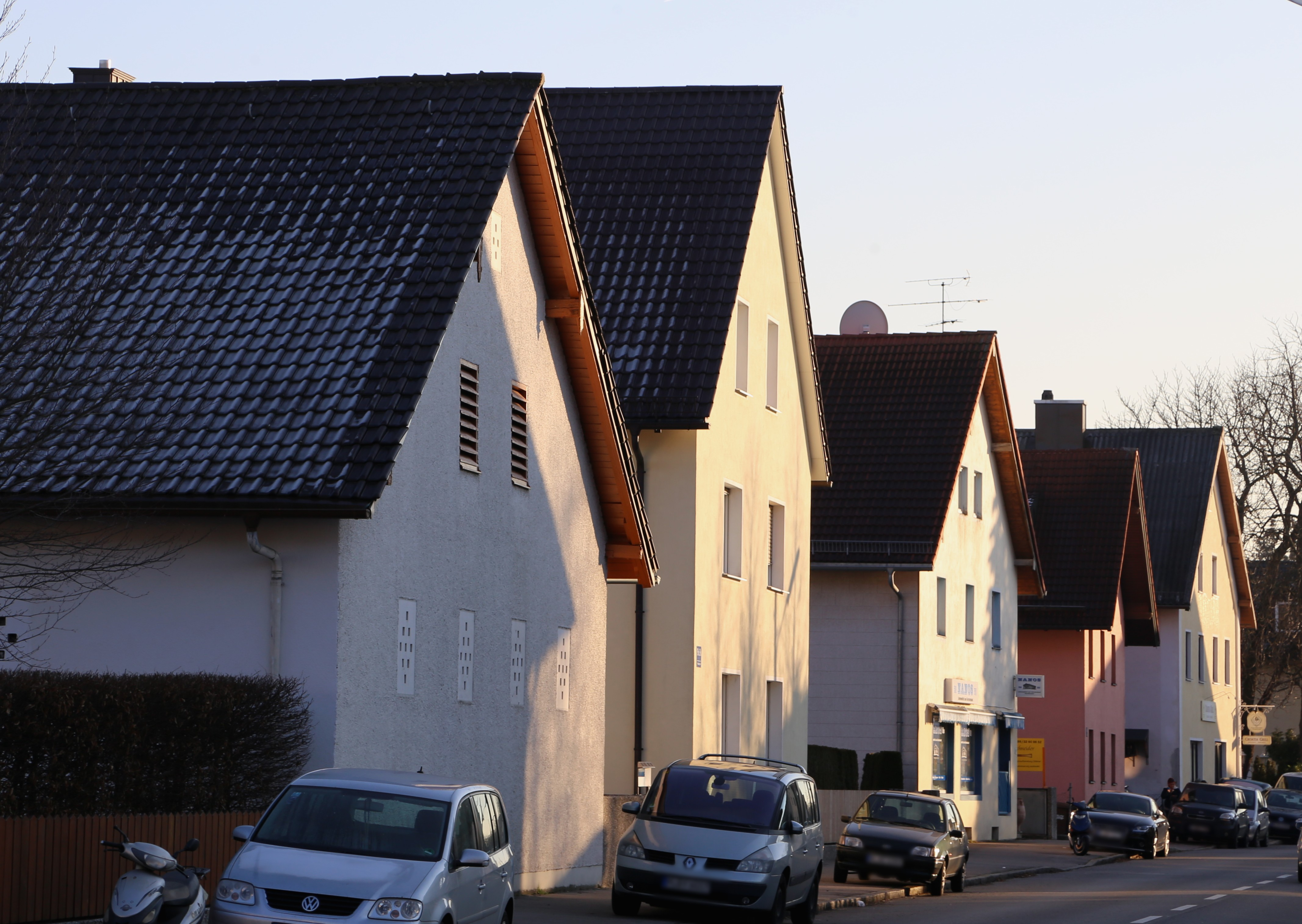 Ensemble Feldmochinger Straße, Feldmoching, München